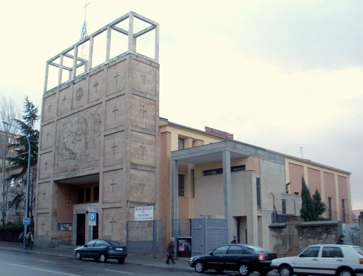 Parroquia del Milagro de San José (Iglesia del Colegio San Estanislao de Kostka), en Salamanca